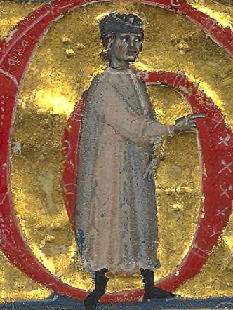 Représentation du troubadour Sahl d'Escola dans un chansonnier du 13e siècle